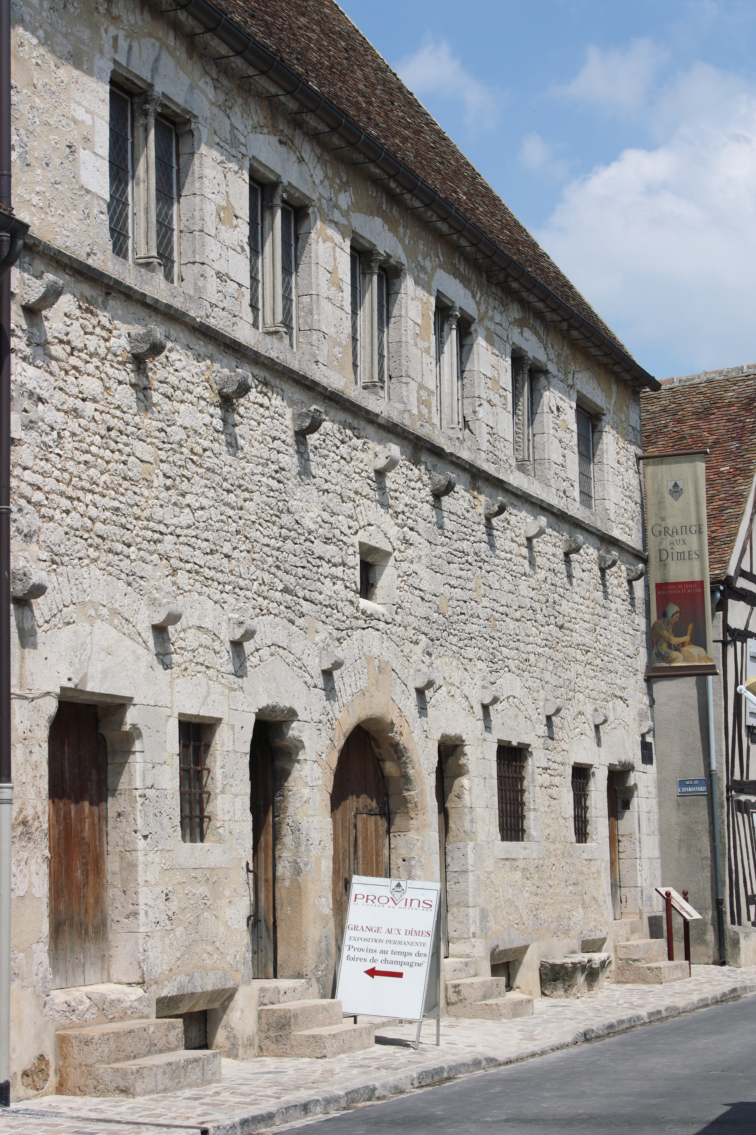 Grange aux dîmes (12./13. Jahrhundert) in Provins, Rue Saint-Jean